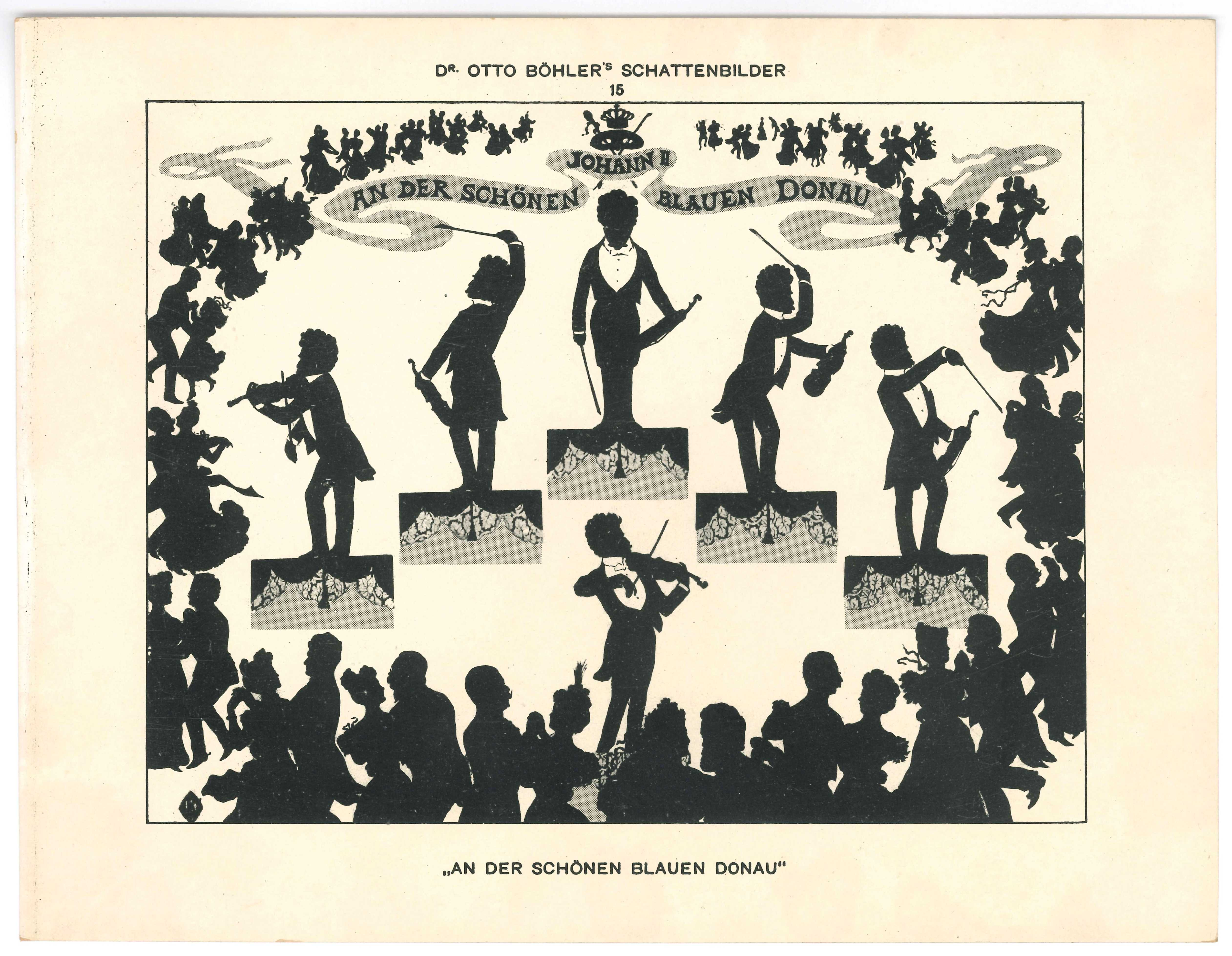 Johann Strauss An der schönen blauen Donau, Silhouette, 26 x 20 cm